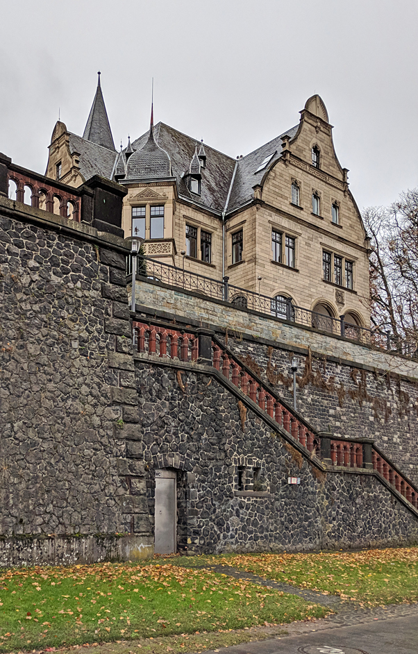 Villa Spiritus gesehen von der Rheinpromenande